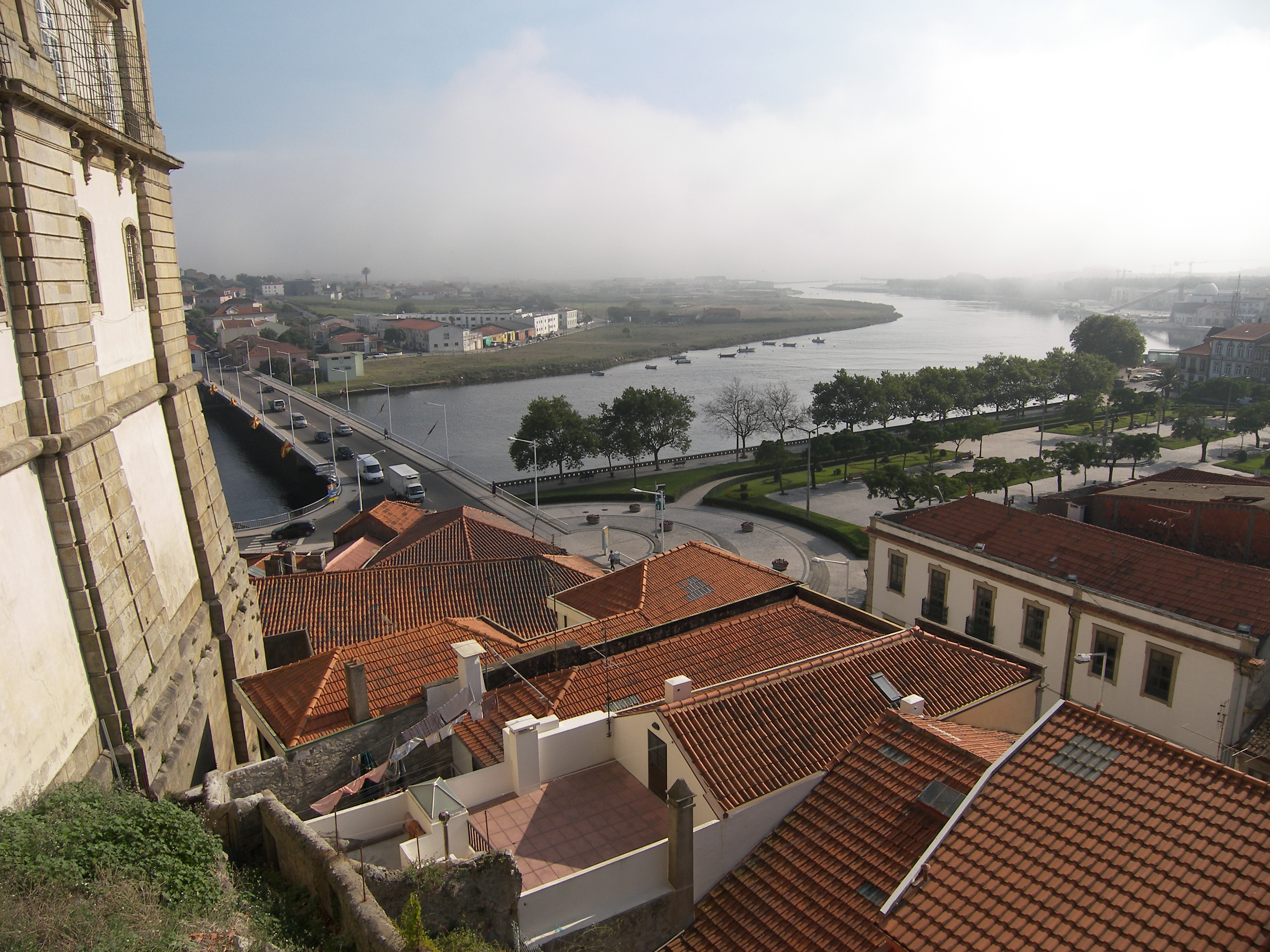 Vila do Conde, Blick vom ehem. Karmeliterinnenkloster auf die Ave-Mündung